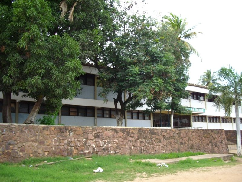 Foto da Unidade Pol. Vidal de Freitas